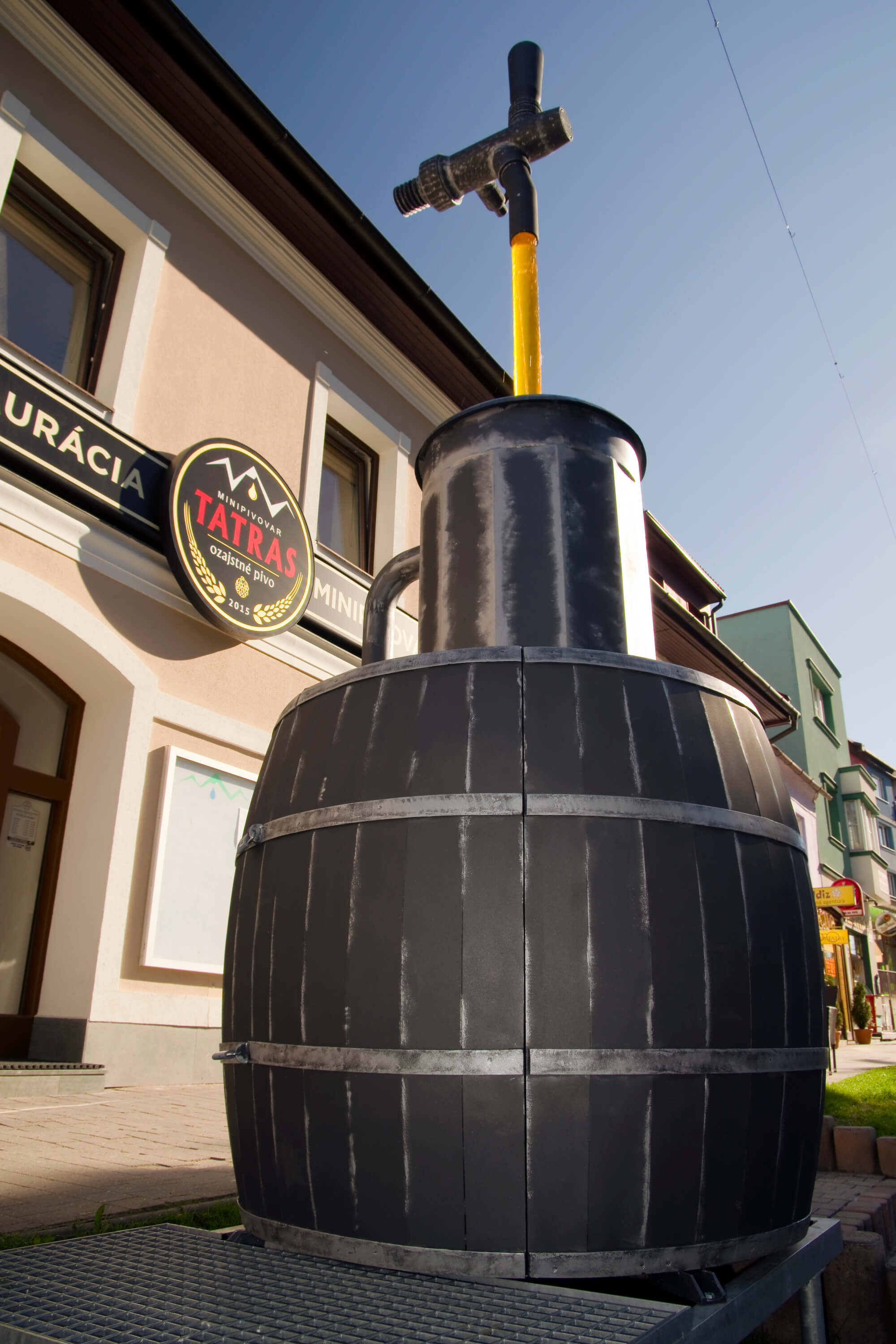 sudok TATRAS